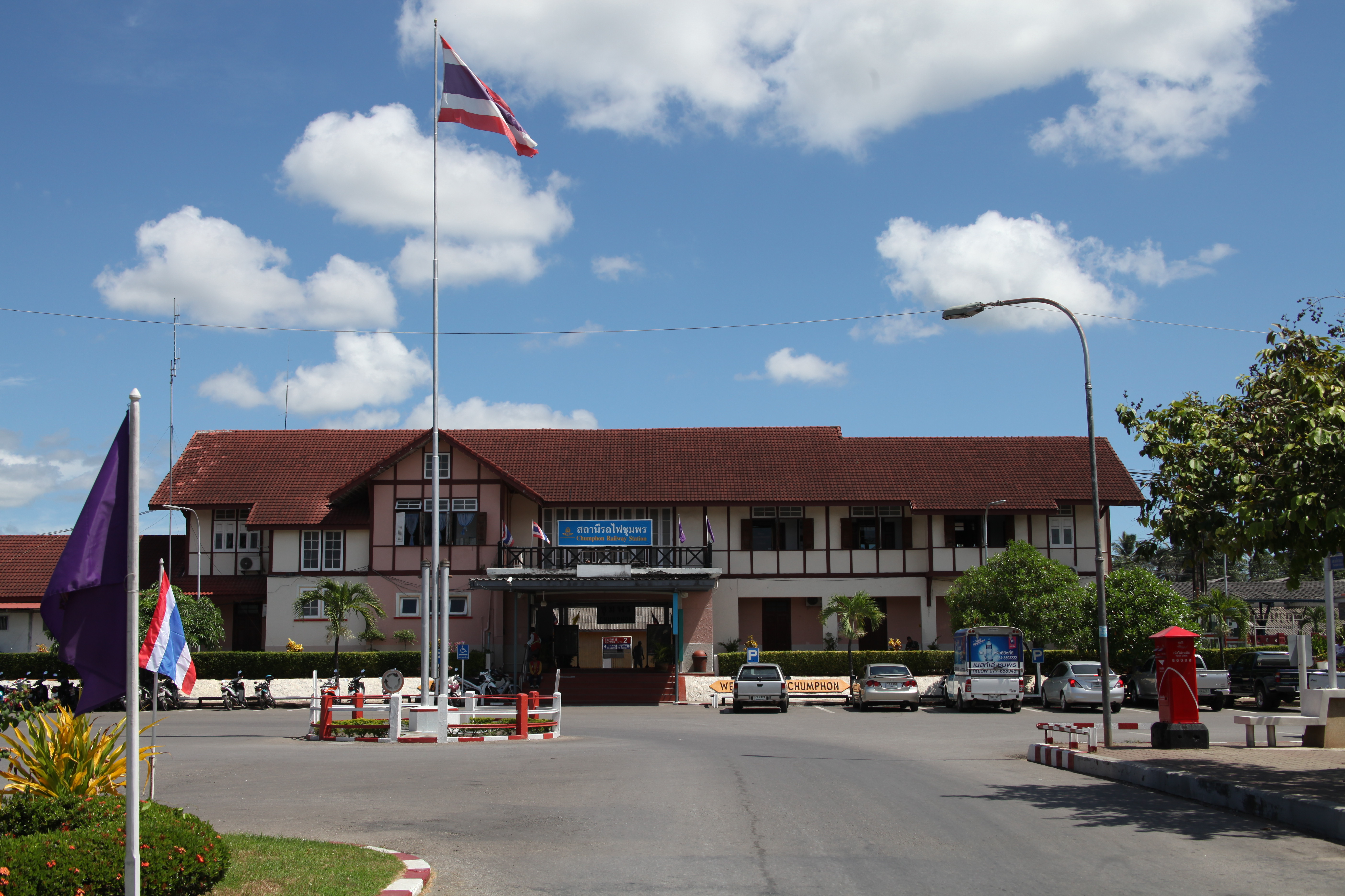 チュムポーン駅